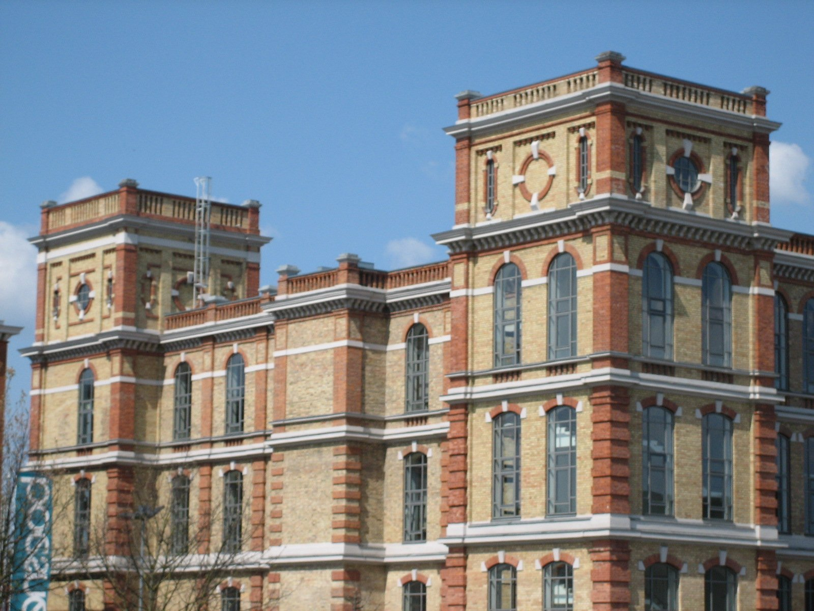 Augsburg, Fabrikschloss im Textilviertel, Südseite